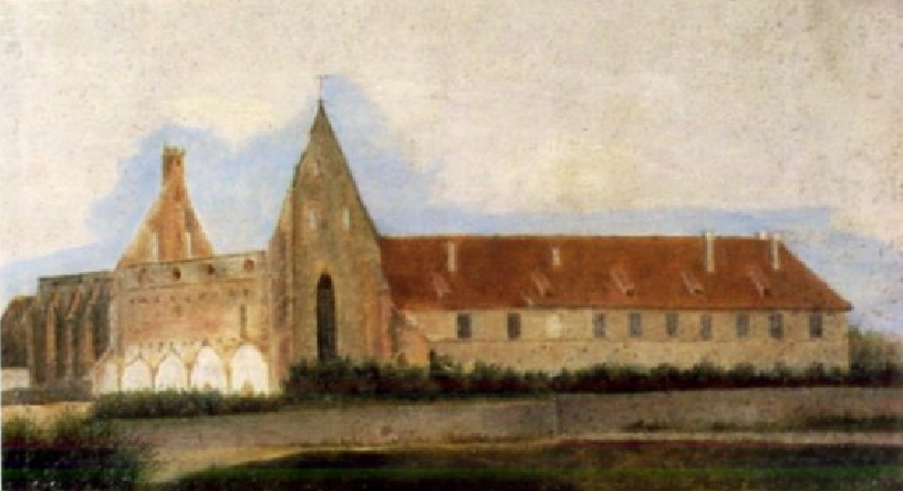 Couvent des Antonins, Issenheim